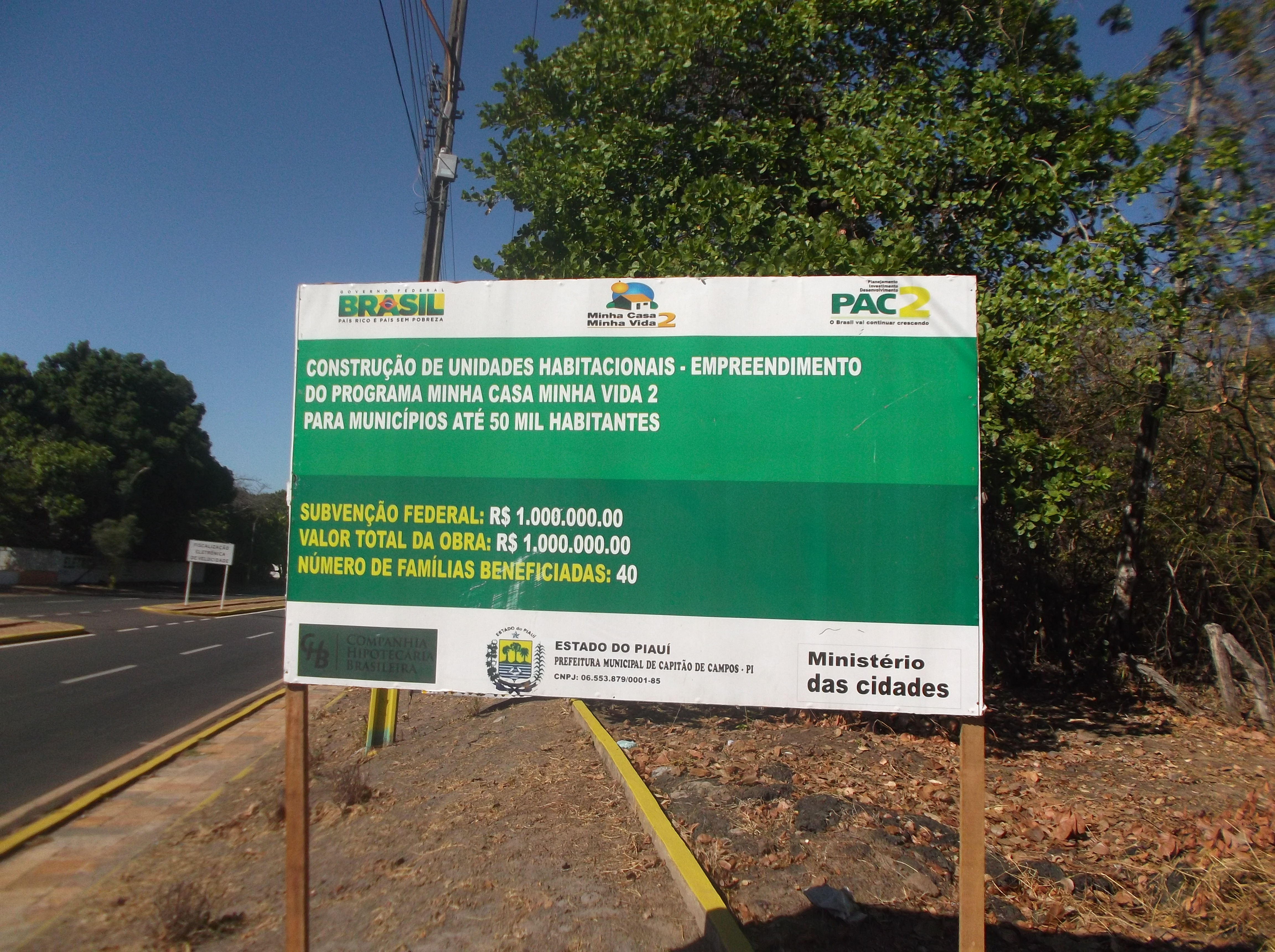 Placa do Minha casa Minha Vida em Capitão de Campos, PI, na margem da BR-343.